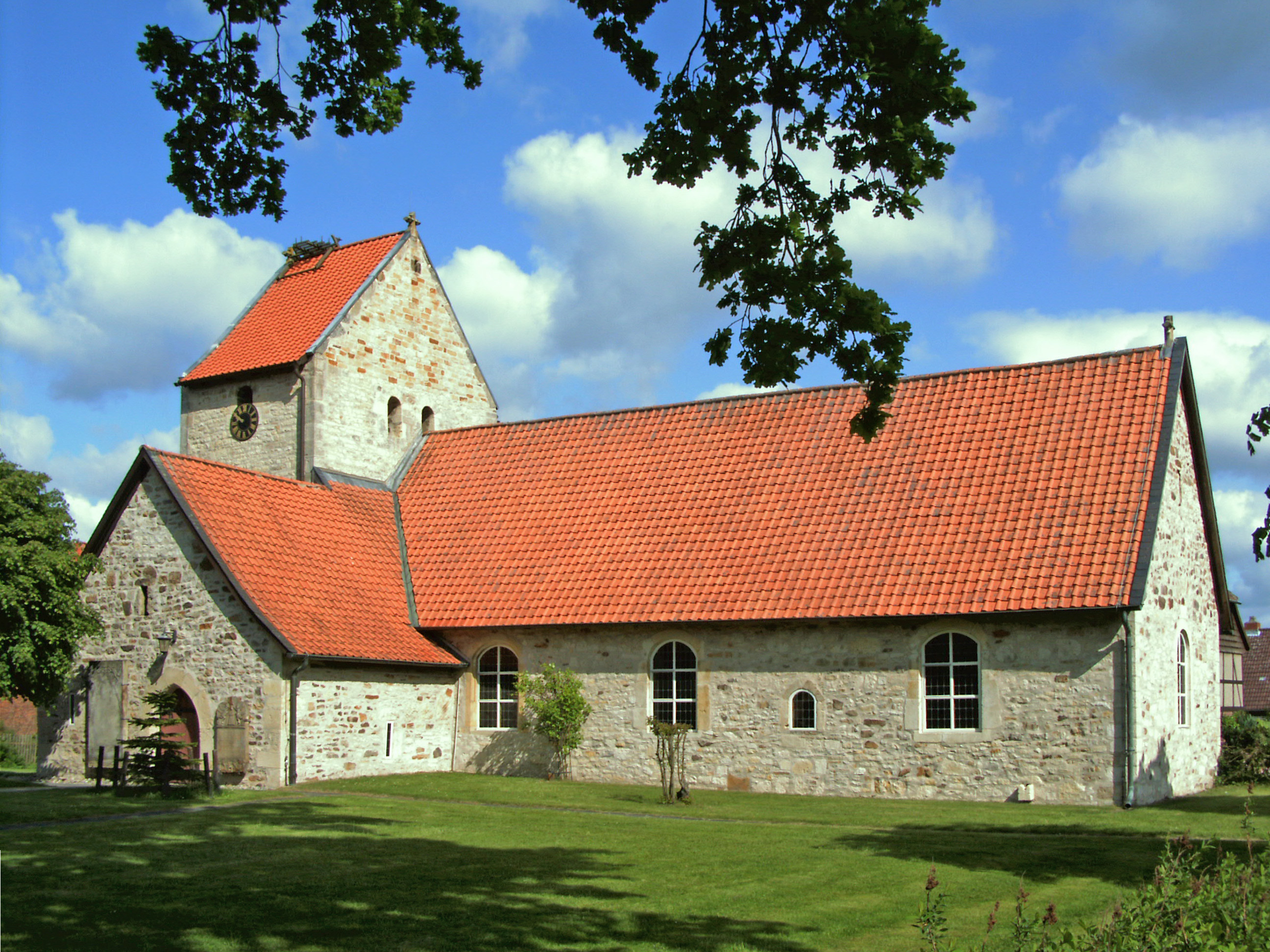 Evangelisch-lutherische Kirche St. Pankratius in Hehlingen, Ortsteil von Wolfsburg.